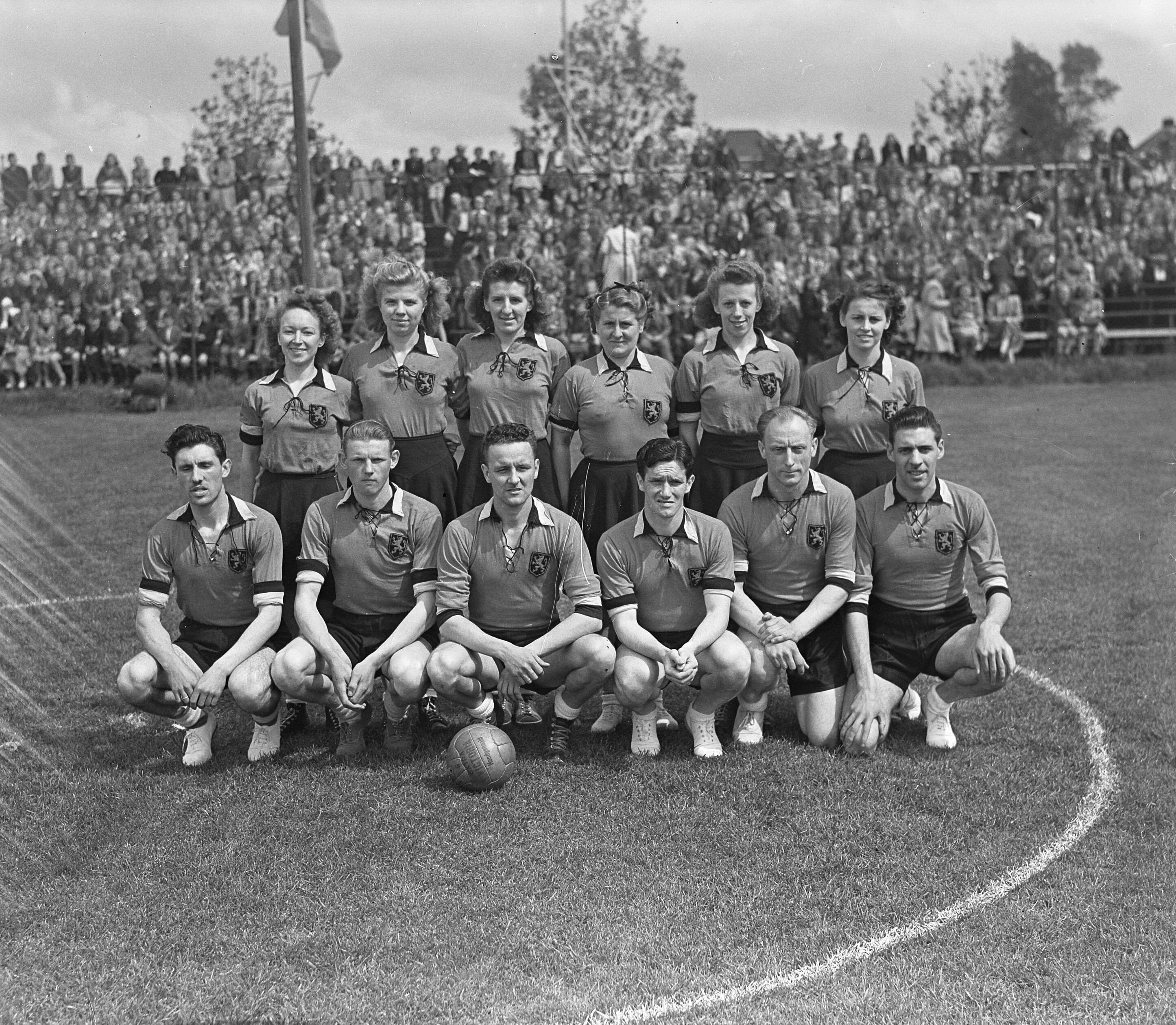 Collectie / Archief : Fotocollectie Anefo Reportage / Serie : [ onbekend ] Beschrijving : Korfbal Nederland-Belgie 6-5. Belgische twaalftal Datum : 15 mei 1949 Locatie : Amstelveen Trefwoorden : groepsportretten, korfbal Fotograaf : Noske, J.D. / Anefo Auteursrechthebbende : Nationaal Archief Materiaalsoort : Glasnegatief Nummer archiefinventaris : bekijk toegang 2.24.01.09 Bestanddeelnummer : 903-3781